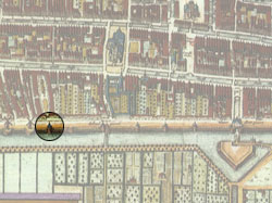 kaart fragment met locatie aanduiding bagijnetoren[1]